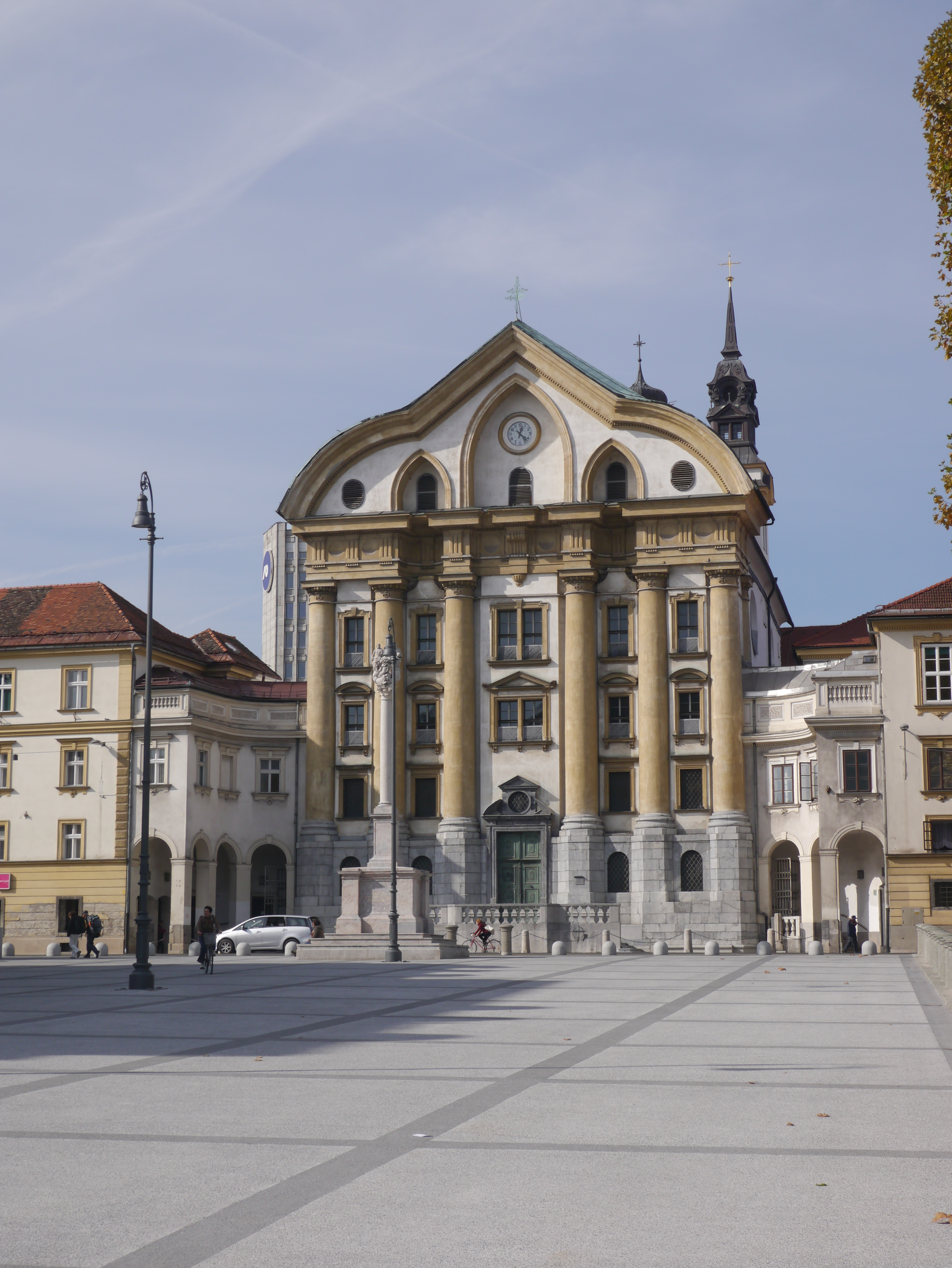 Uršulinski samostan, Ursuline monastery, church